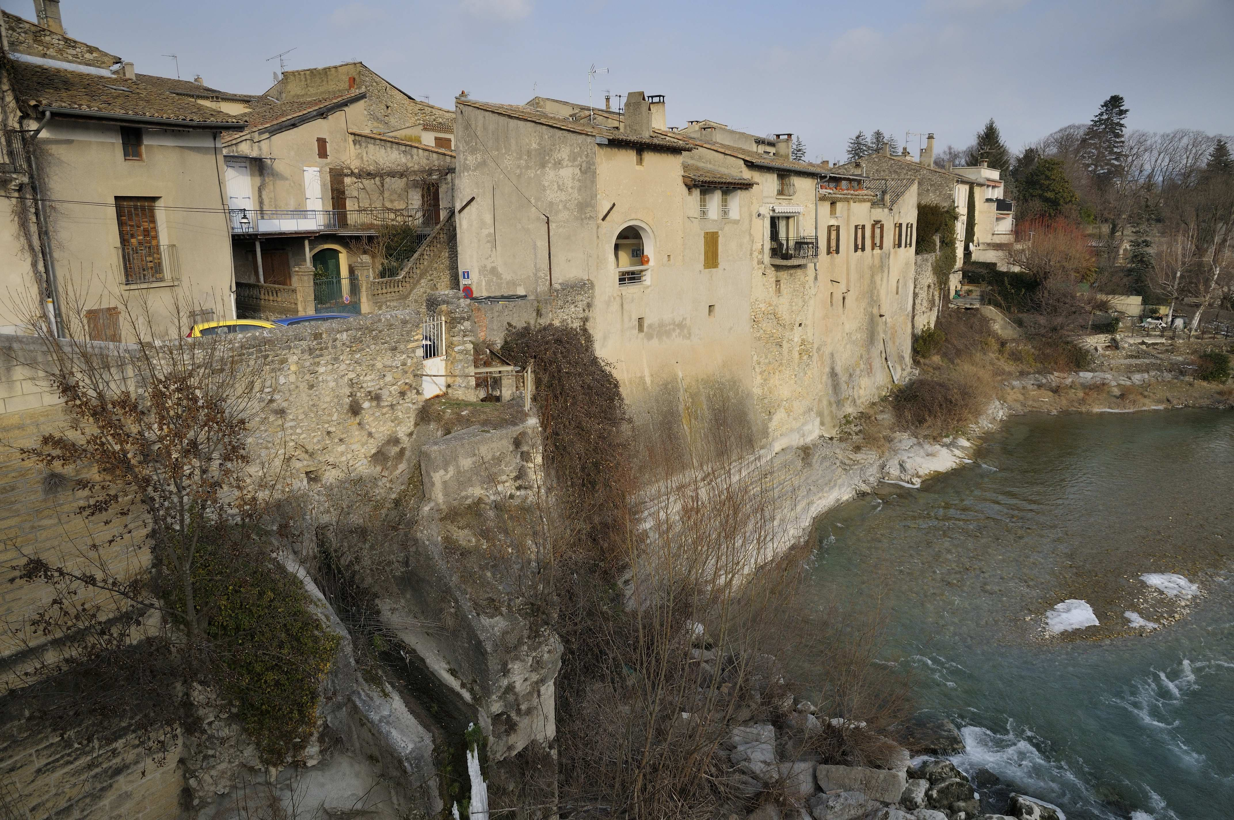 aouste pont sur la Drôme